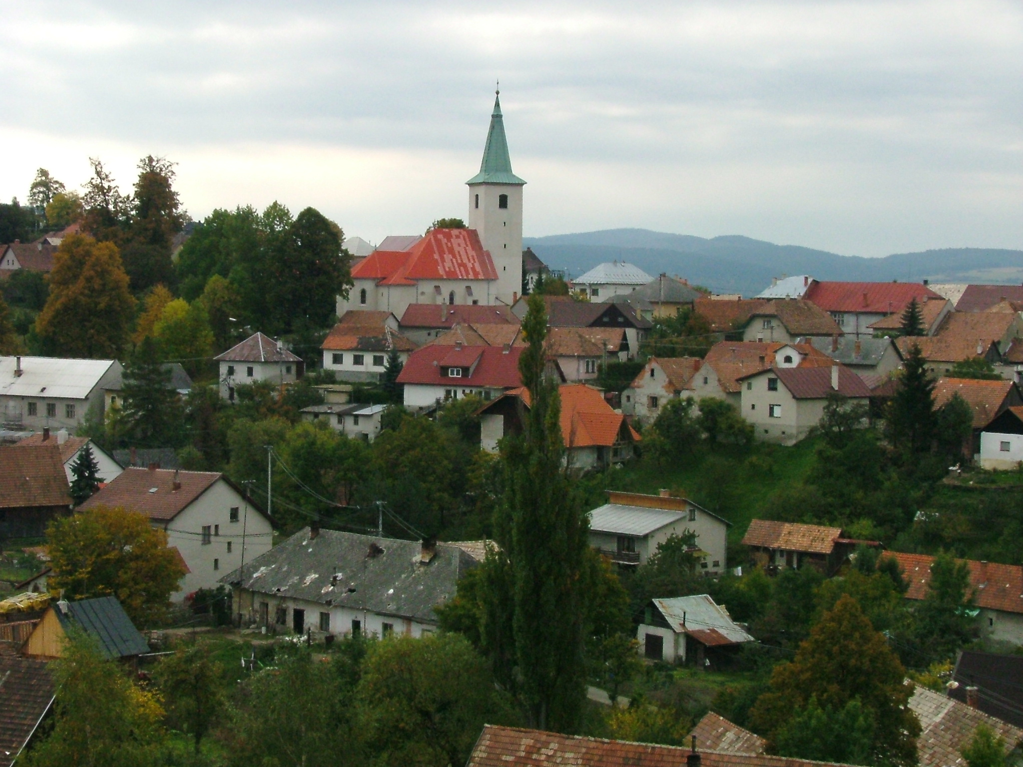 Horna Stubna